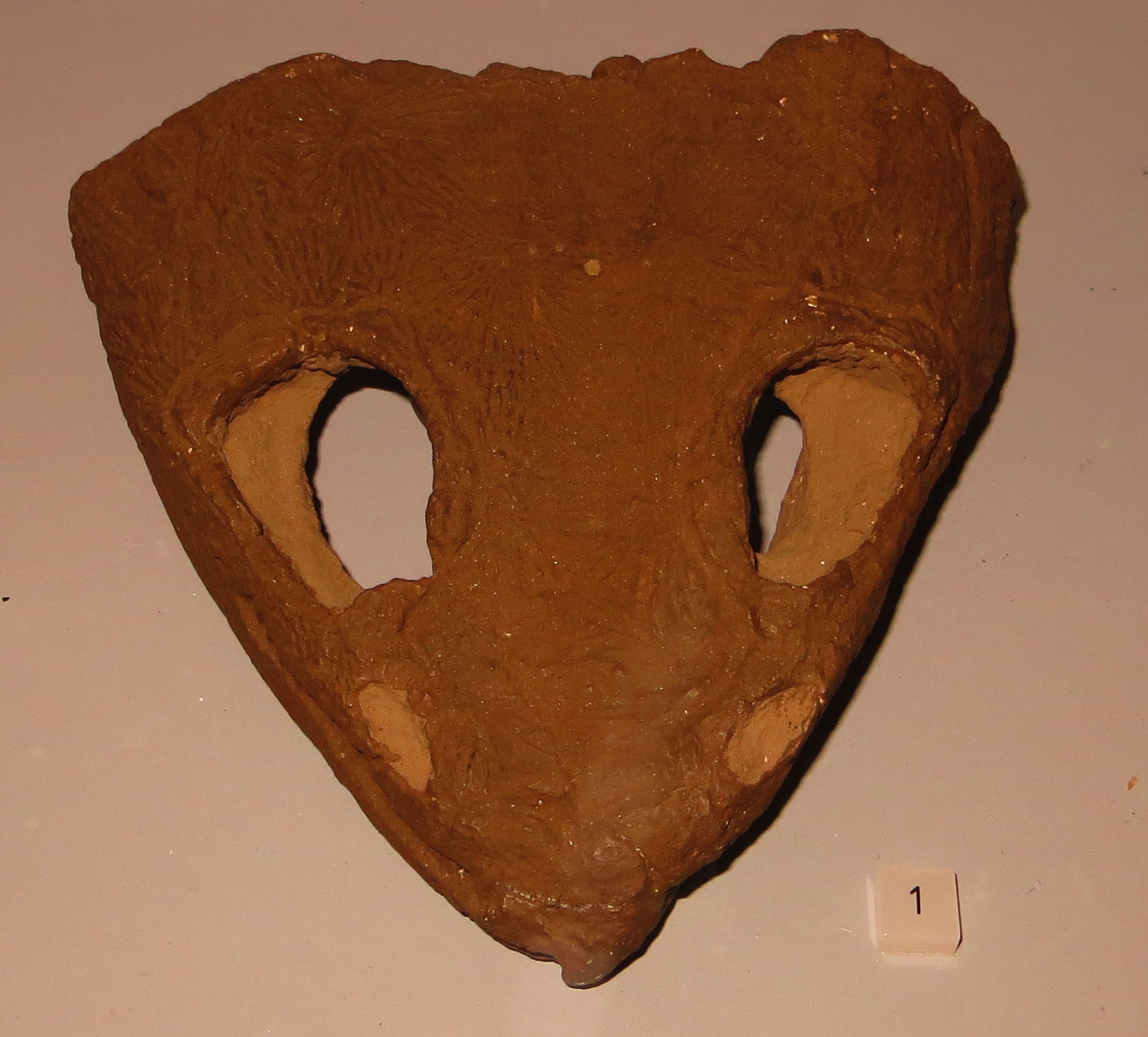 Fossil of Dvinosaurus, an extinct amphibian- Took the picture at Museum of Paleontology, Tuebingen